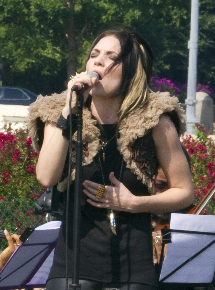 Skylar Grey chantant au Tibet Talk For World Peace à Washington.